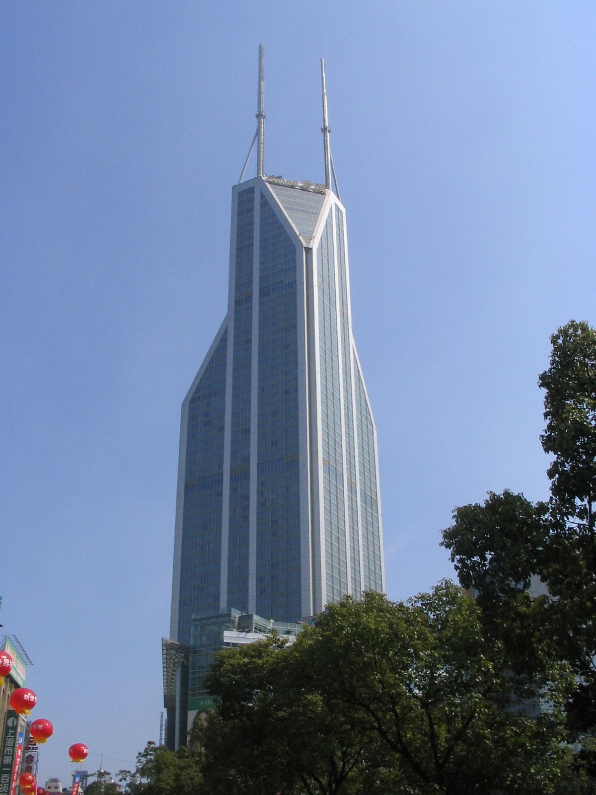 上海世贸国际广场 Shimao International Plaza